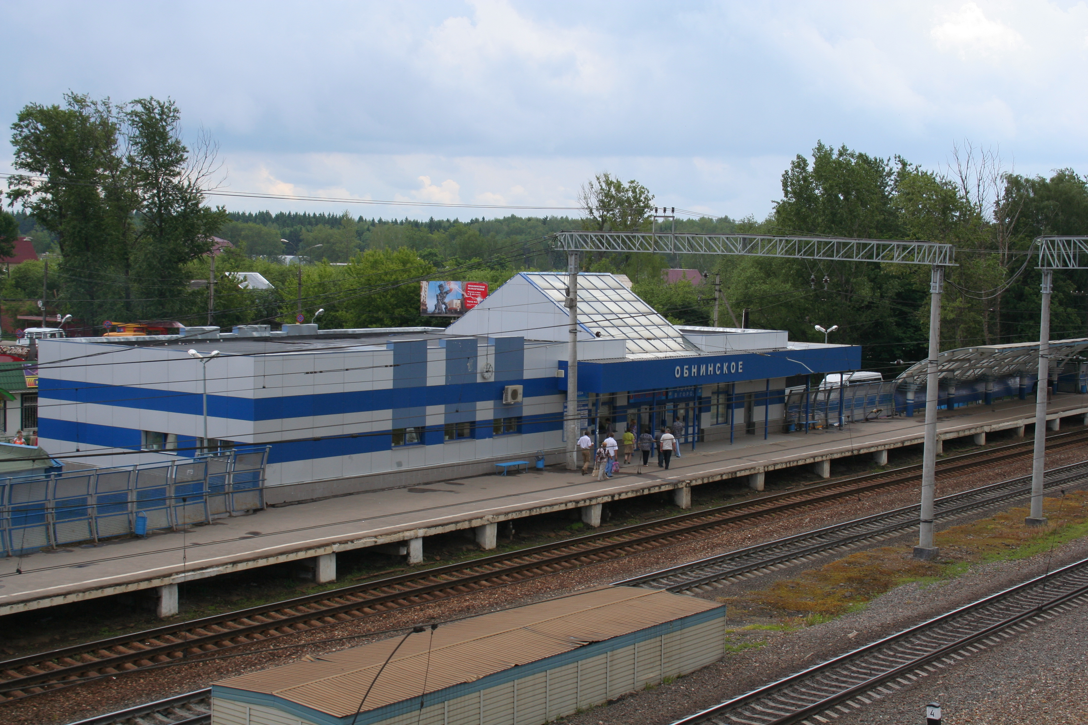 Bahnhof Obninskoje, Oblast Kaluga, Russland